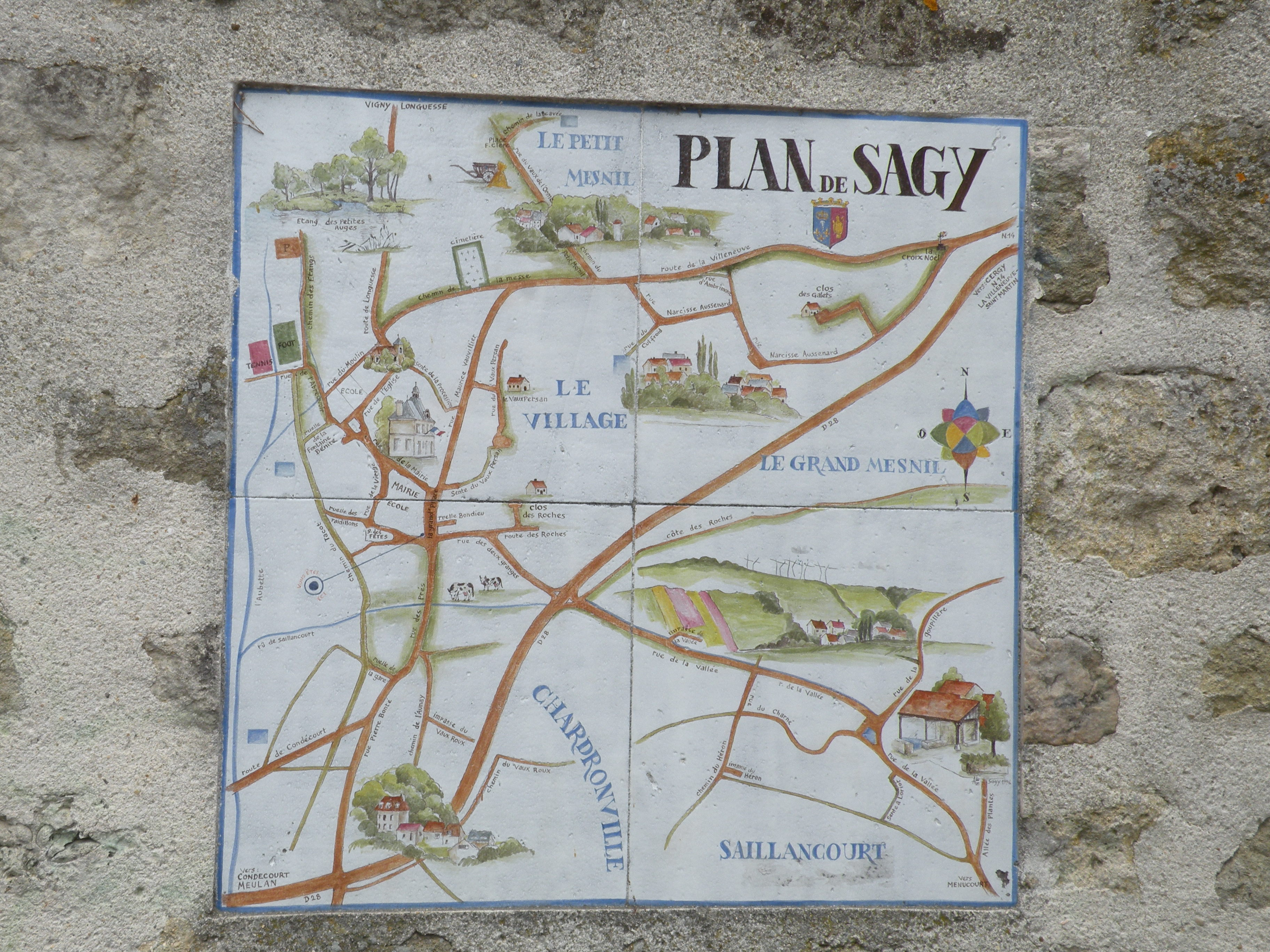 plan de sagy sur l’arrêt de bus